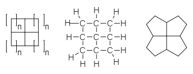 Fenestranes